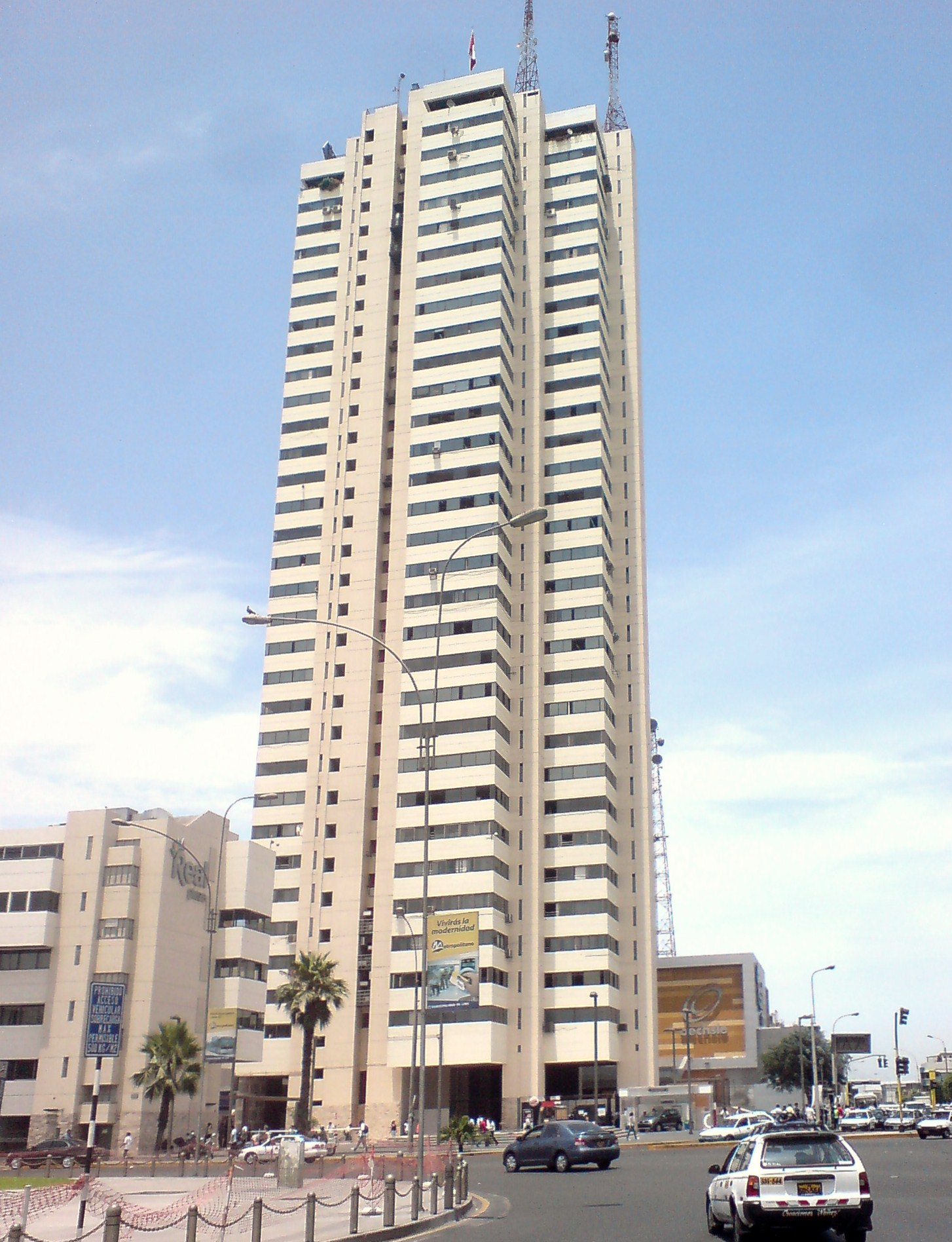 Centro Civico 2